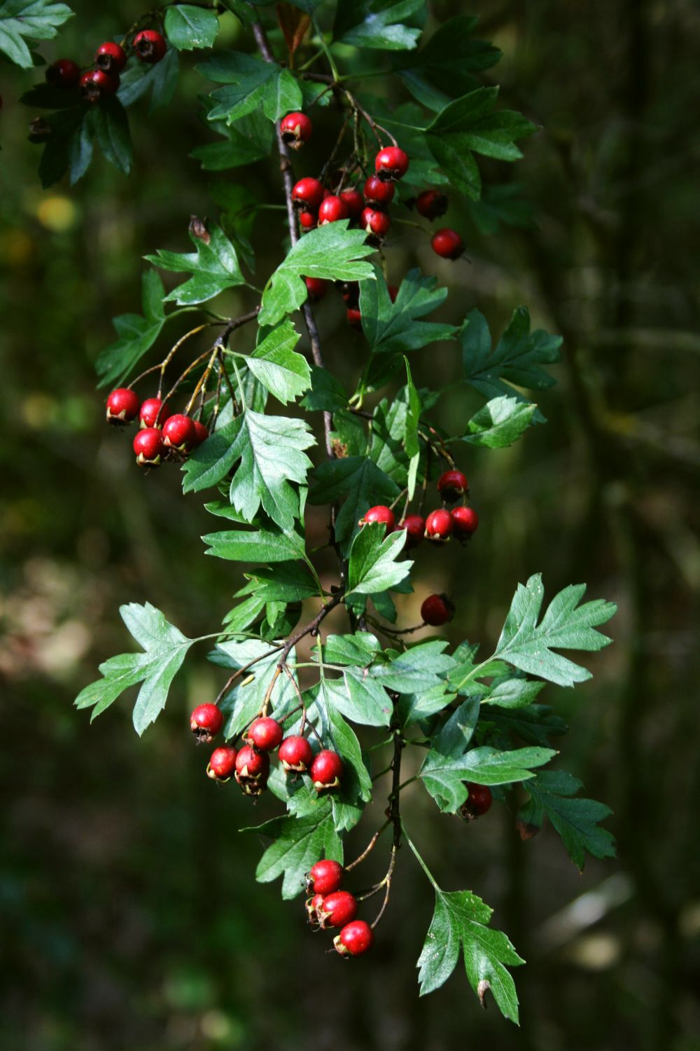 Eingriffeliger Weißdorn (Crataegus monogyna), Rosengewächse (Rosaceae) - Österreich/Austria/Autriche: Niederösterreich, Weinviertel, „Steinbergwald“ zwischen Zistersdorf und Neusiedl an der Zaya